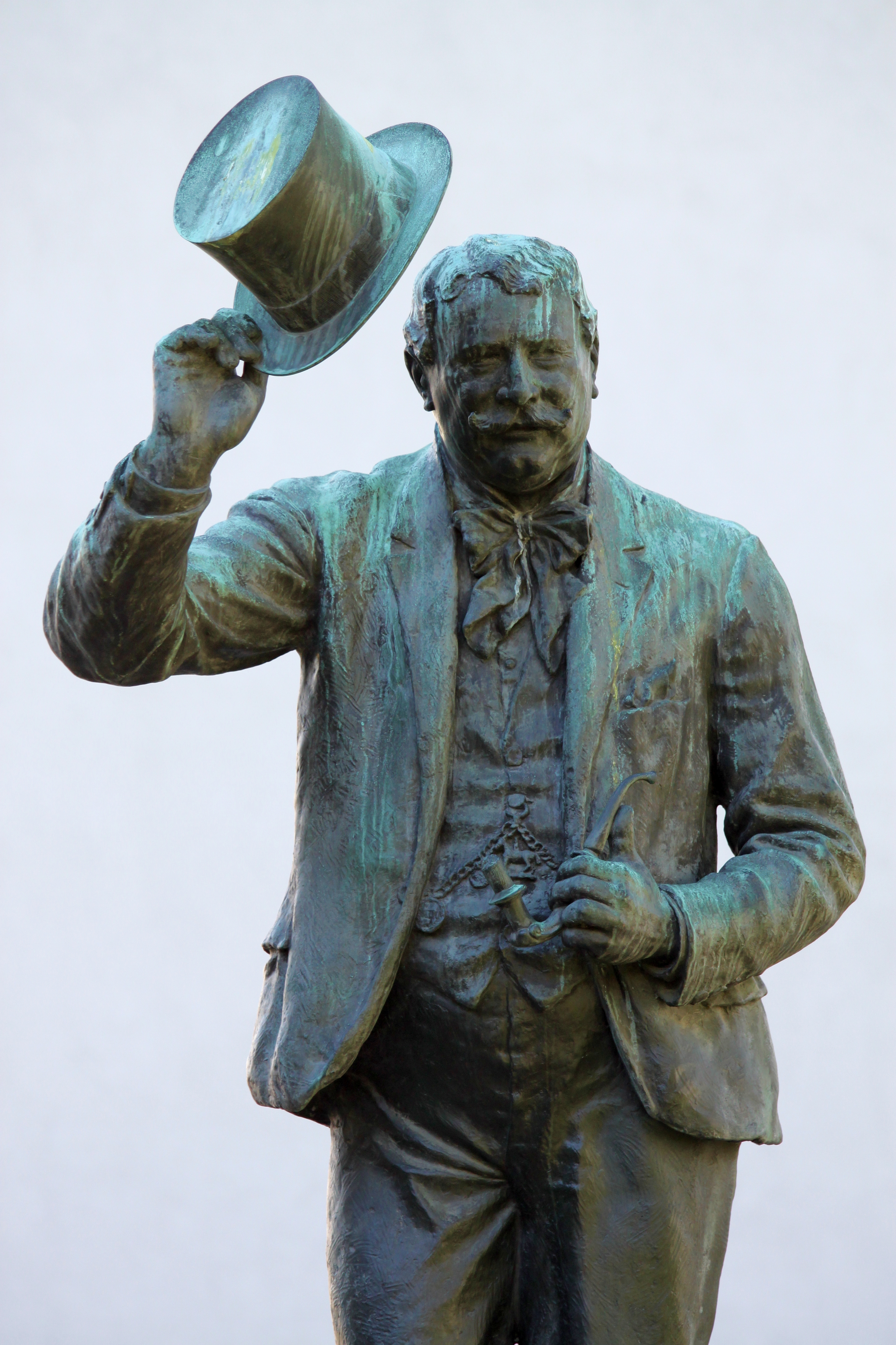 Fiaker - Denkmal